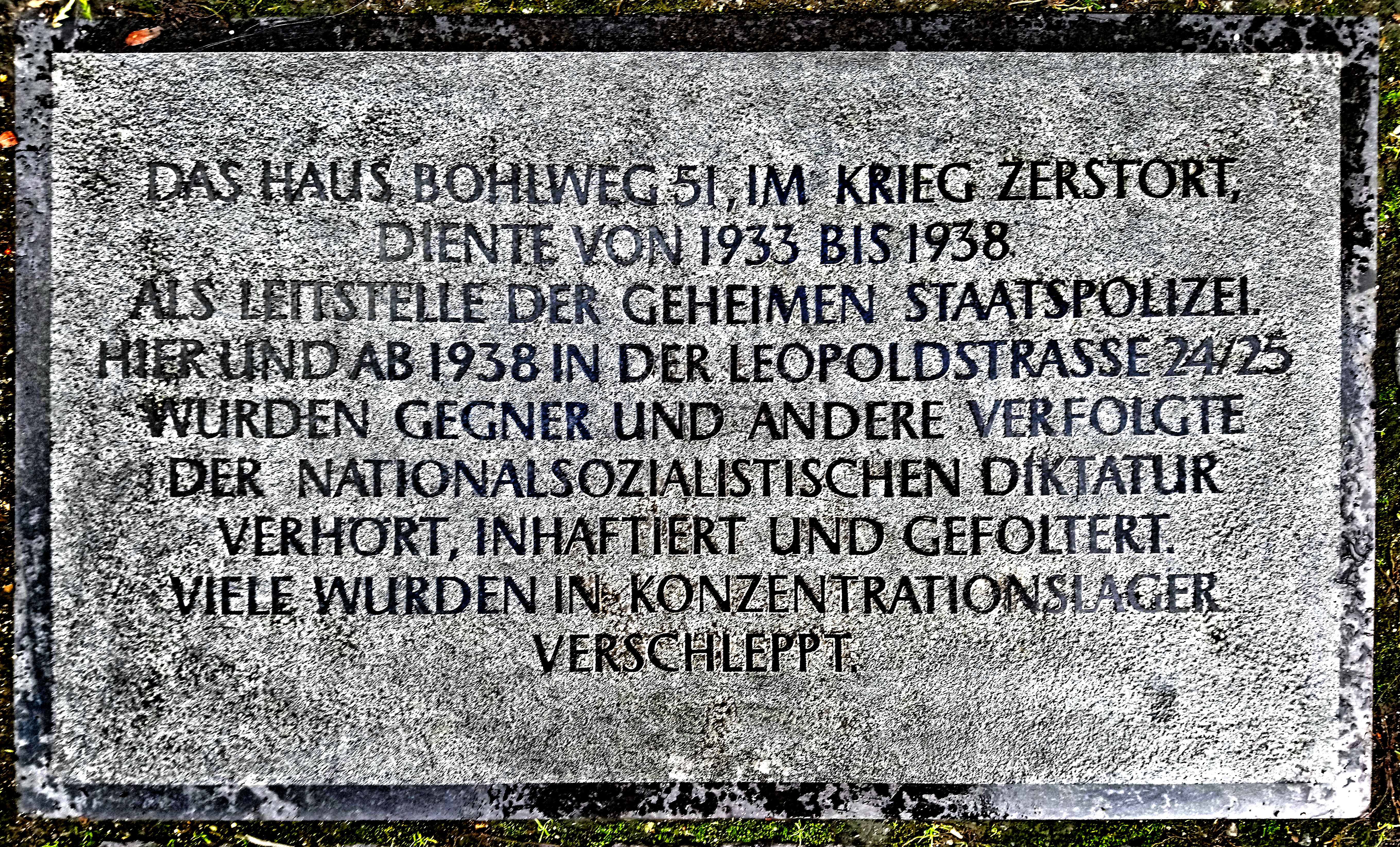 Braunschweig, Bohlweg 51: Am 25.März 2015 eingelassene Gedenktafel für die im Zweiten Weltkrieg zerstörte Zentrale der Geheimen Staatspolizei (Gestapo).